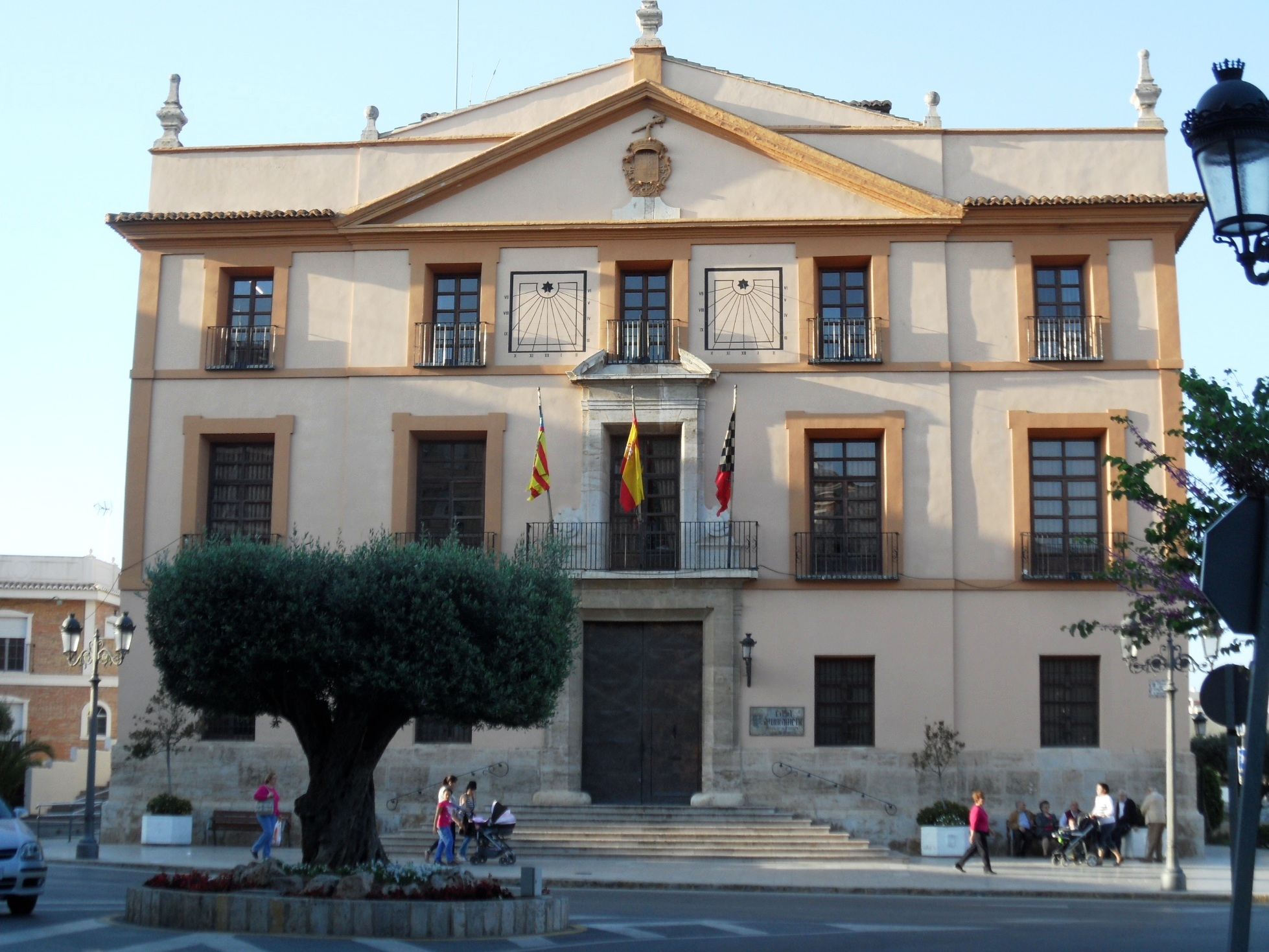 Ajuntament de Paterna.